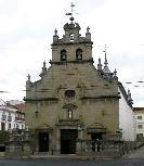 Ermita de San Antonio